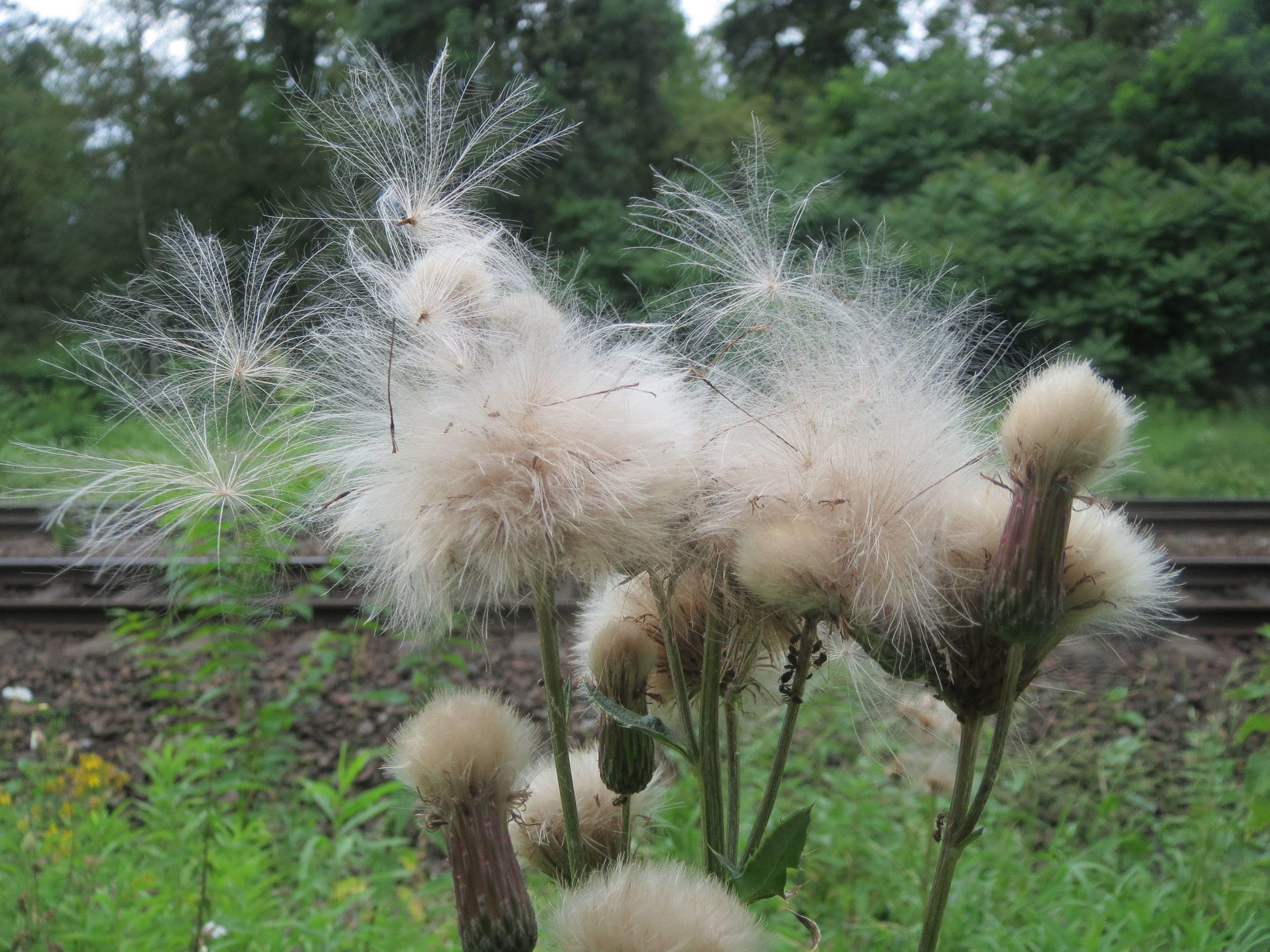 Acker-Kratzdistel (Cirsium arvense) im Schwetzinger Hardt